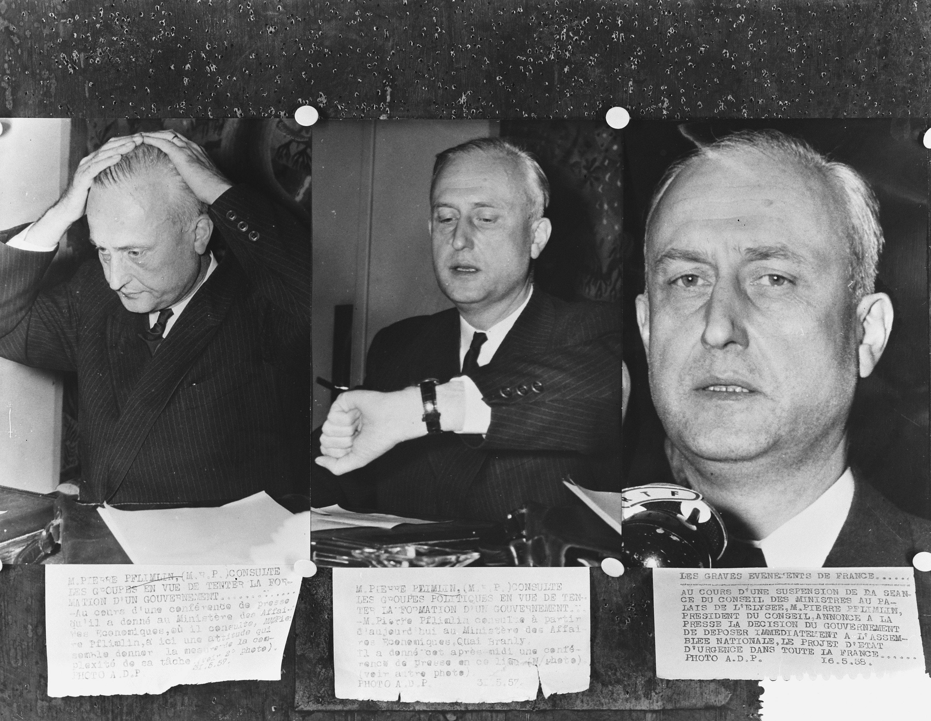 Collectie / Archief : Fotocollectie Anefo Reportage / Serie : [ onbekend ] Beschrijving : Pierre Pflimlin Datum : 28 mei 1958 Fotograaf : Fotograaf Onbekend / Anefo Auteursrechthebbende : Nationaal Archief Materiaalsoort : Glasnegatief Nummer archiefinventaris : bekijk toegang 2.24.01.09 Bestanddeelnummer : 909-5917